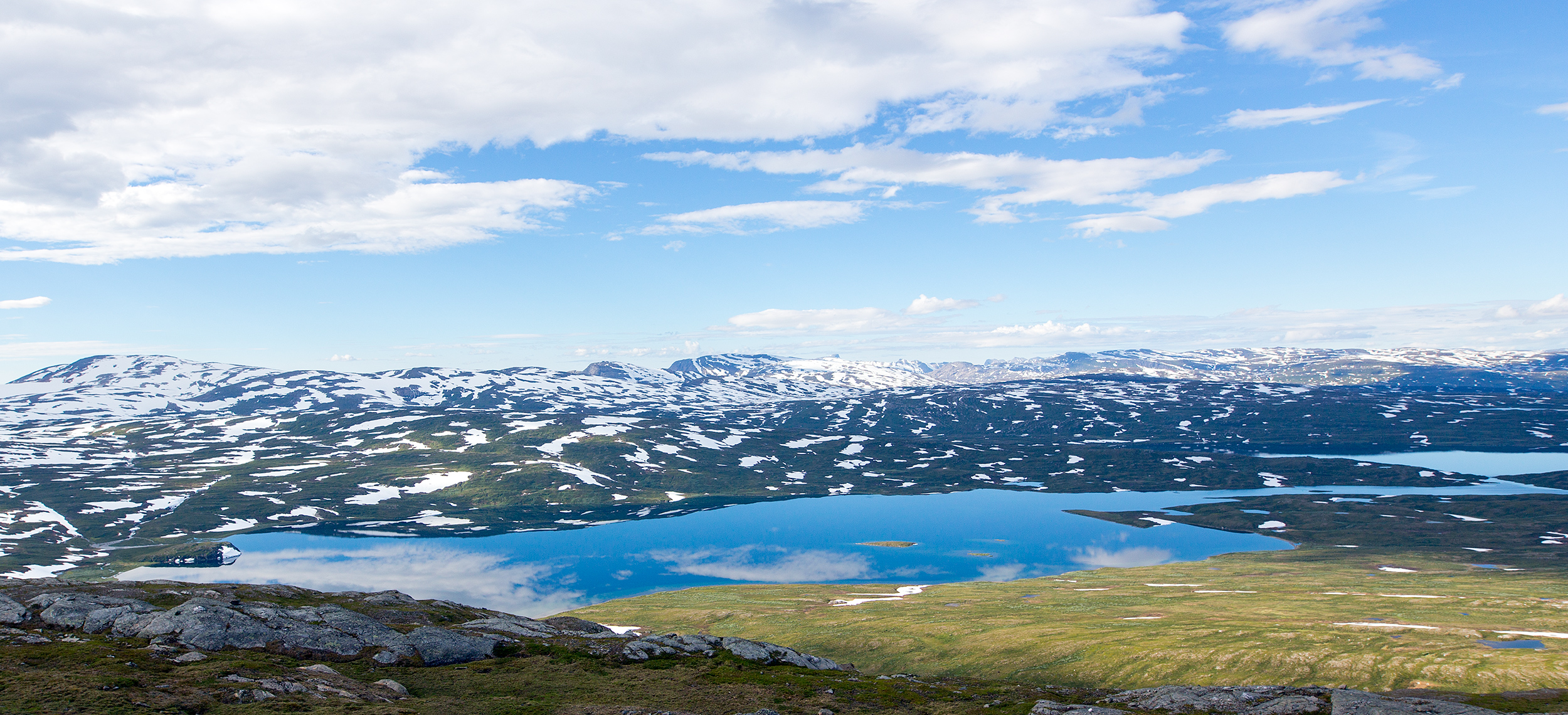 Utsikt från norra sidan av 1014 över Raddujávrre.